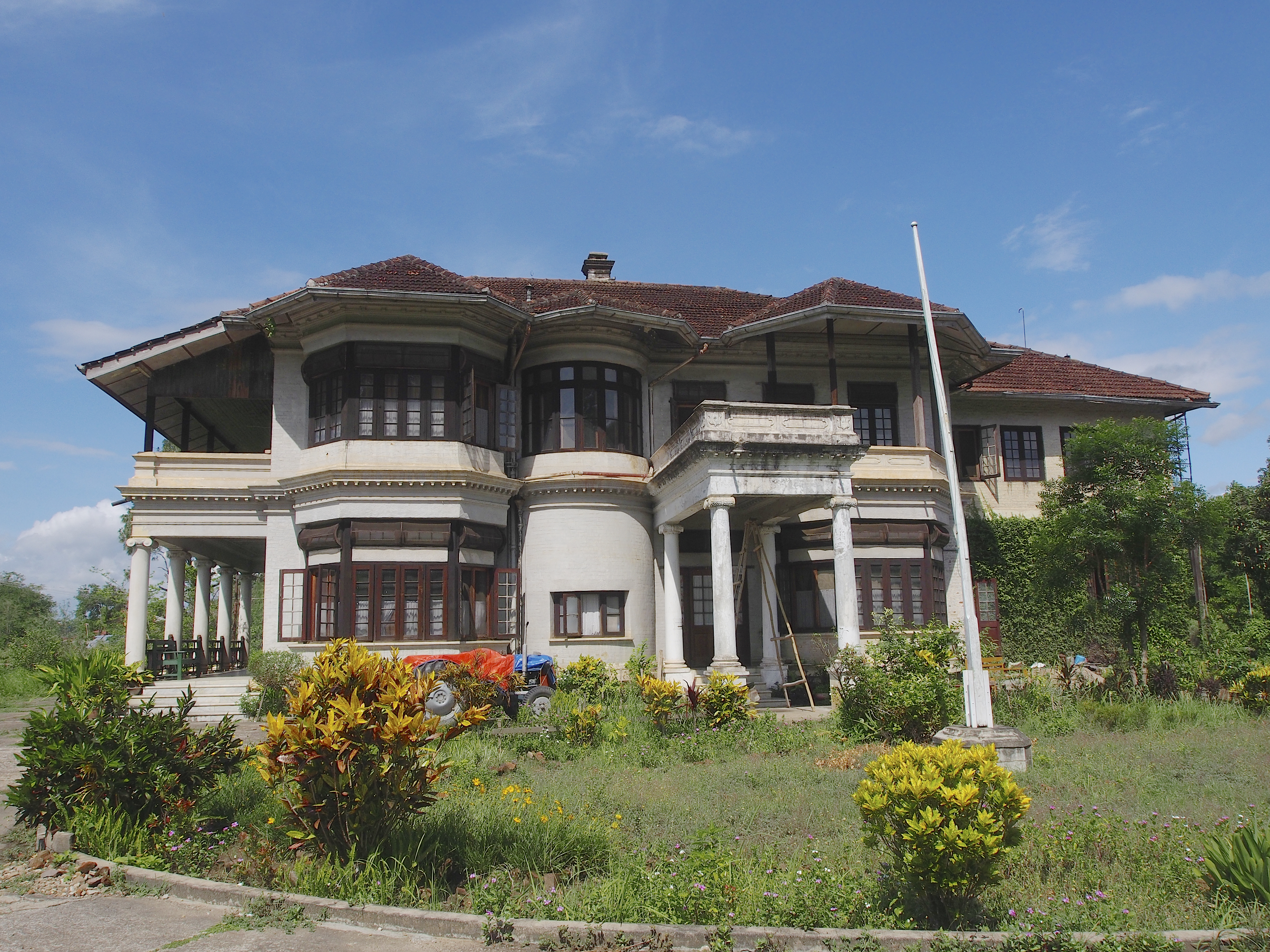 Shan Palace, Hsipaw Myanmar